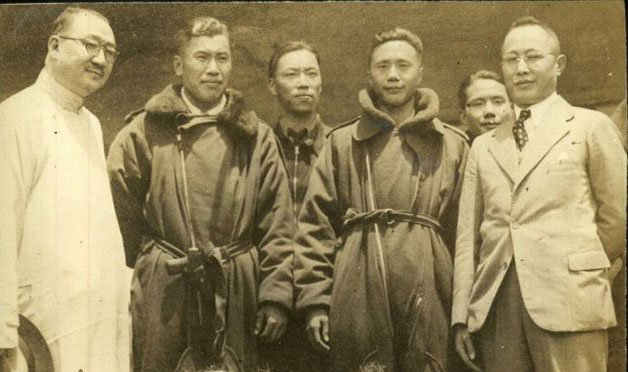 日本への「伝単爆弾」から漢口に帰投した14中隊人員